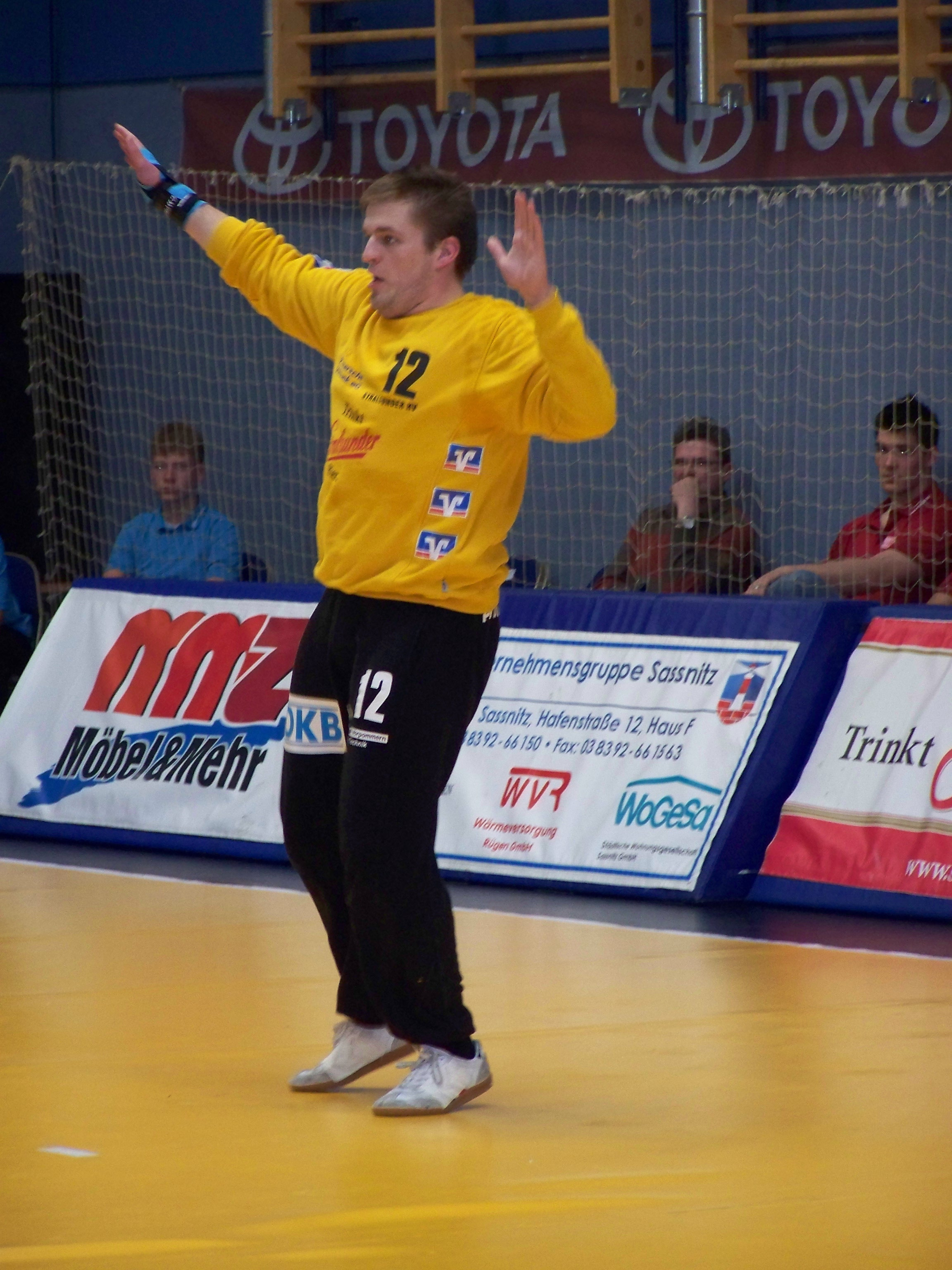 Der Handballspieler Felix Herholc vom Stralsunder HV beim Bundesliga-Spiel gegen den MT Melsungen, Siebenmeter.